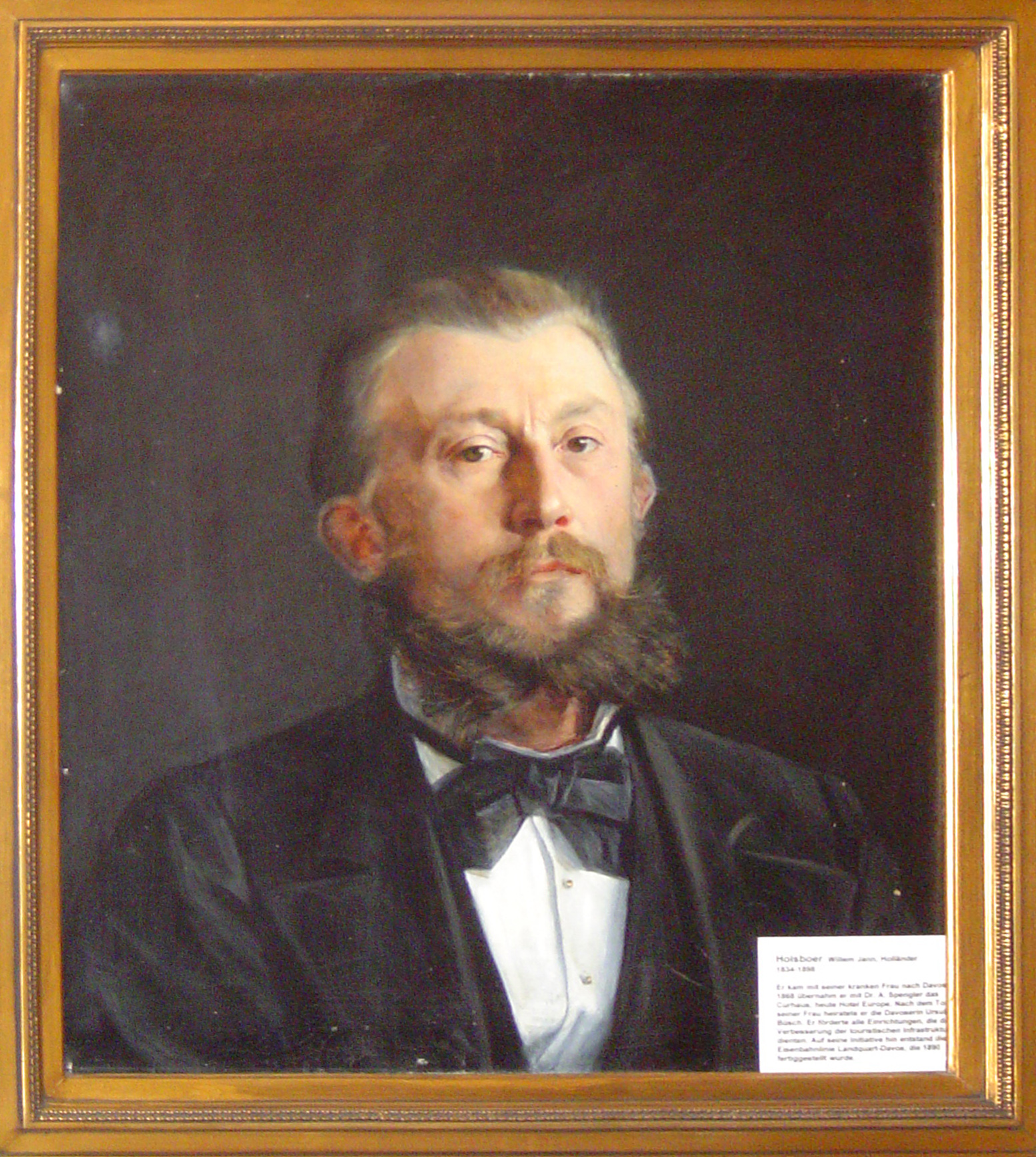 Willem-Jan Holsboer in Heimatmuseum Davos